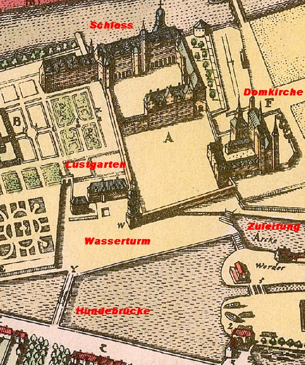 Lage der Berliner "Wasserkunst"